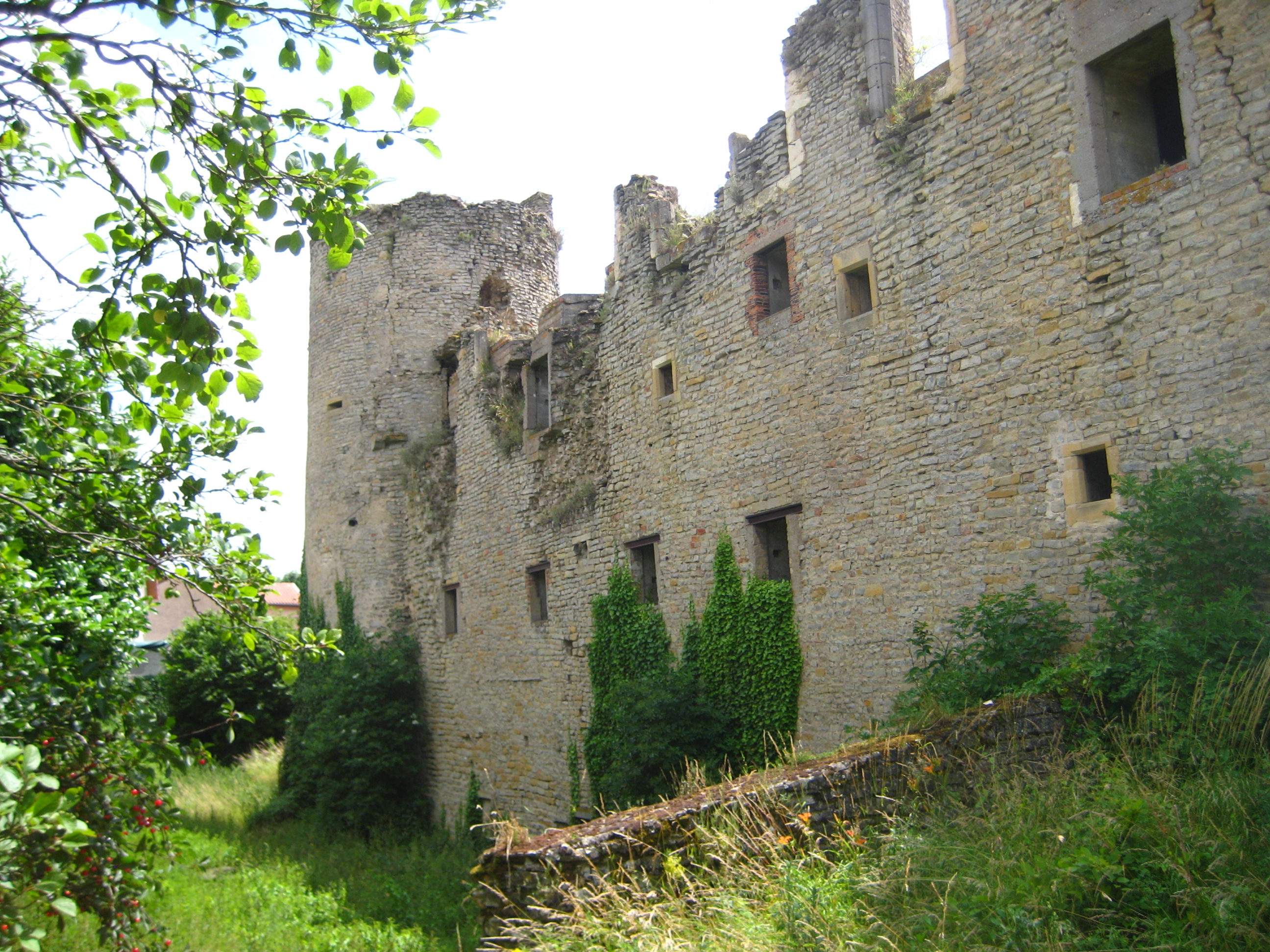 Description Château de Louvigny Moselle Date25 June 2009Sourcemon appareil photoAuthorAimelaime . Château de Louvigny Moselle